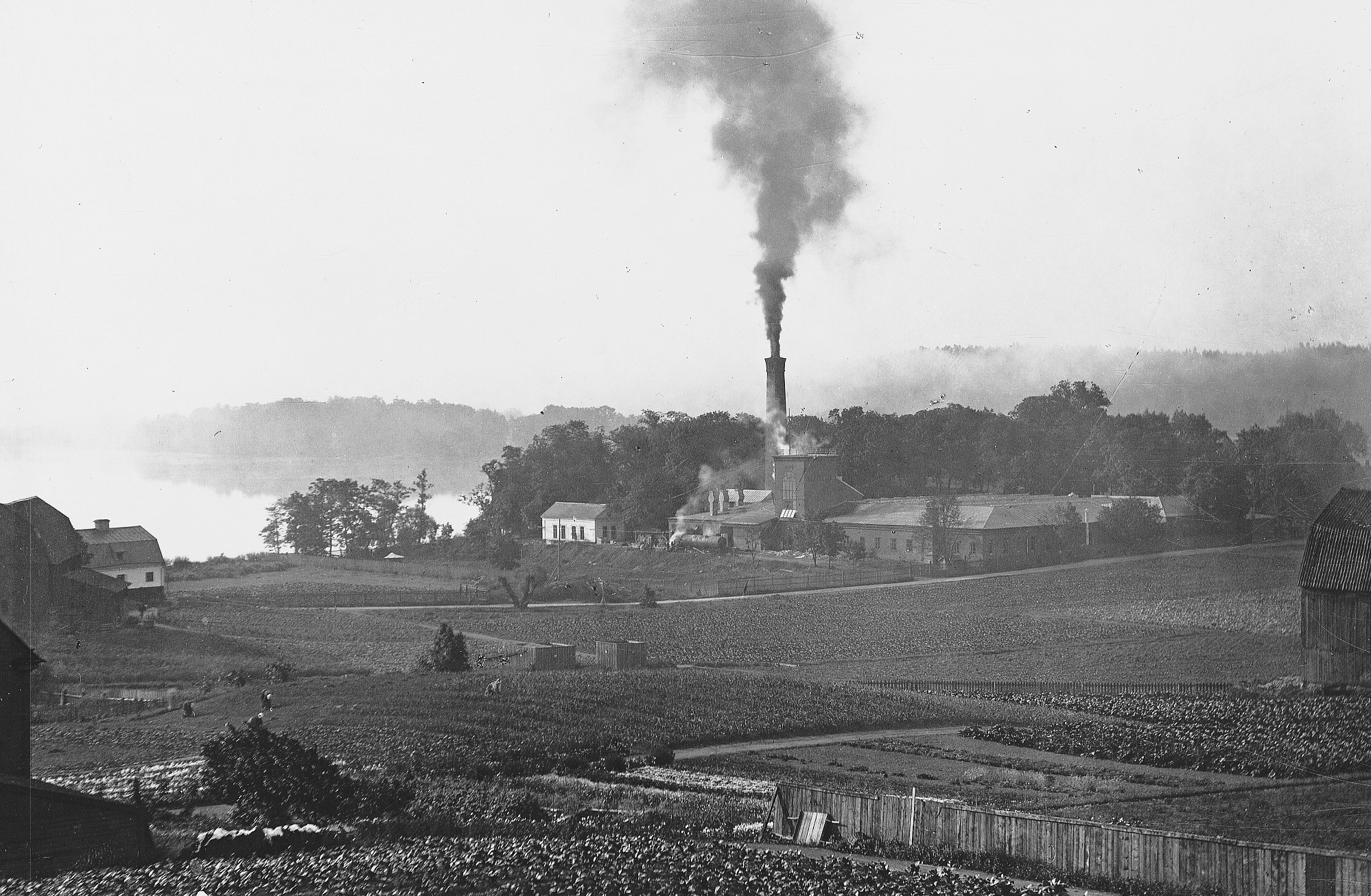 Stockholms bomullsspinneri vid Barnängen, utsikt från Bondegatan